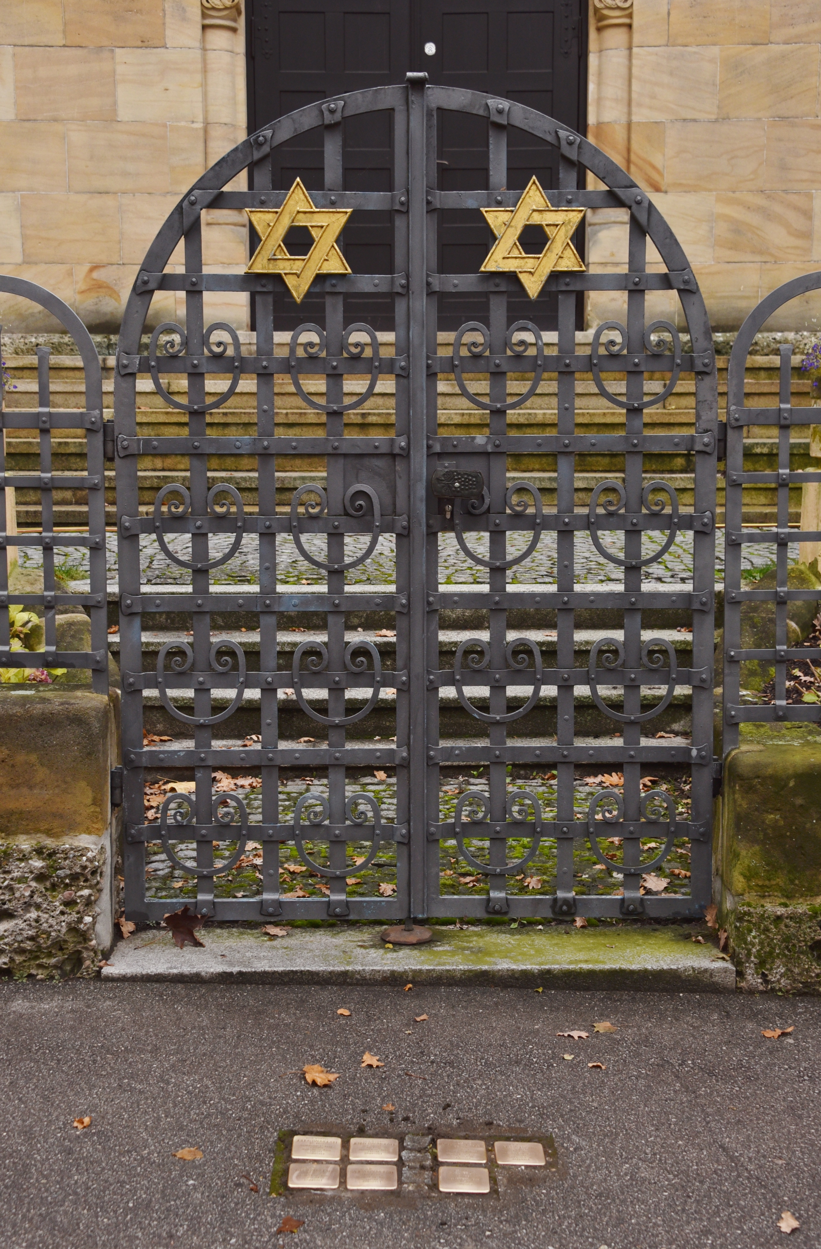 Synagoge Straubing Eingang mit Stolpersteinen